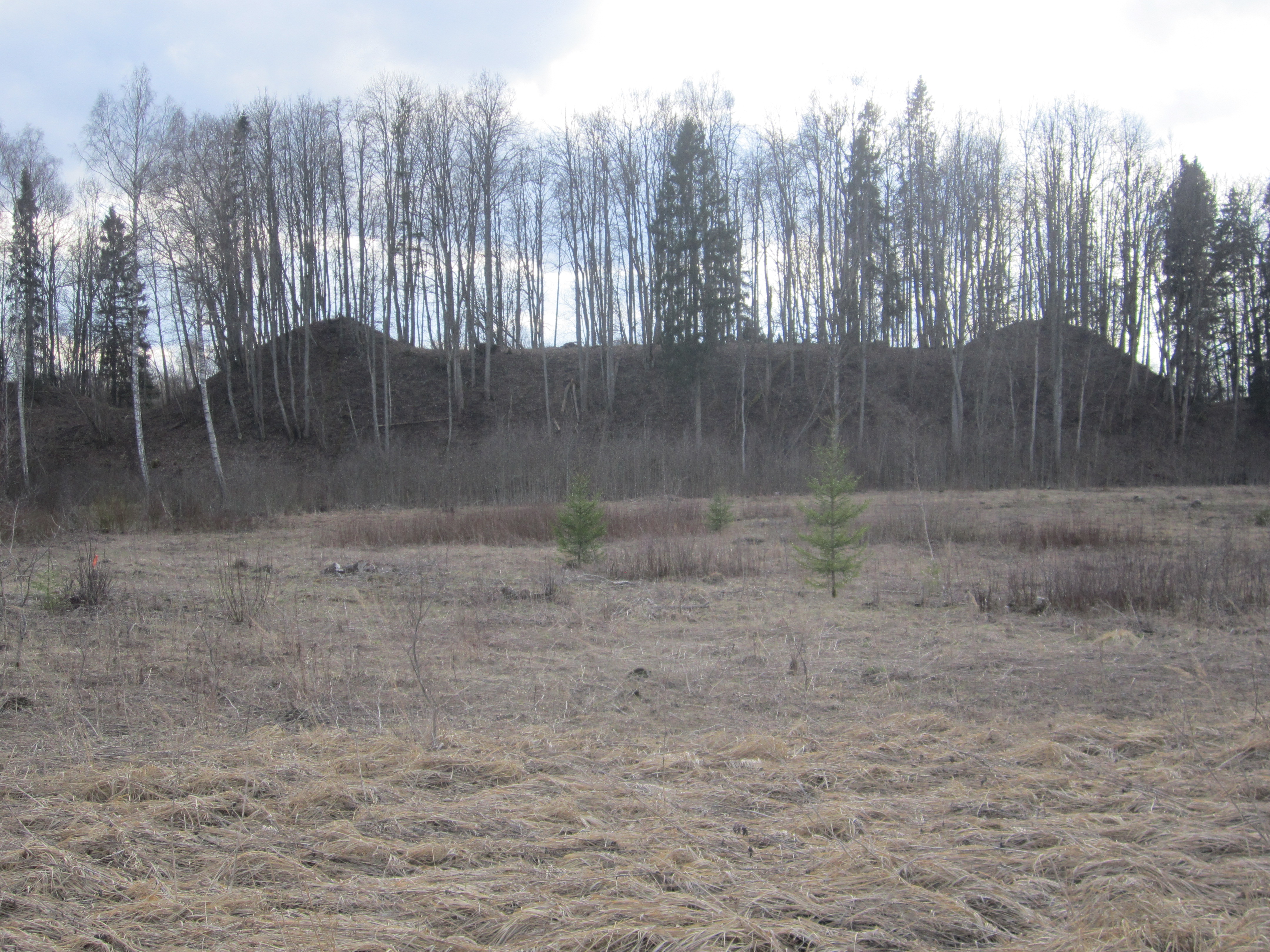 Ķoderu pilskalns (Lielā Vīra gulta)